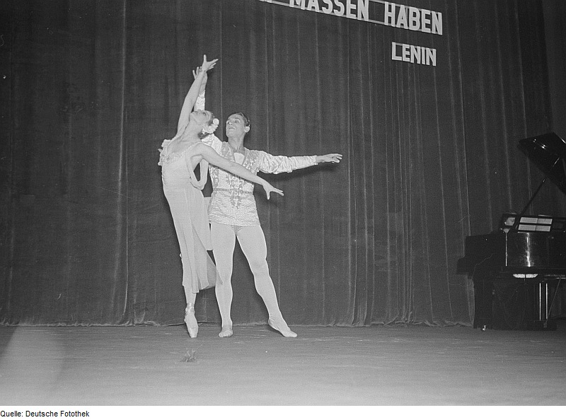 Original image description from the Deutsche Fotothek Gemeinsamer Auftritt der Ballettänzer Maria Plissezkaja und Jurij Kondratow